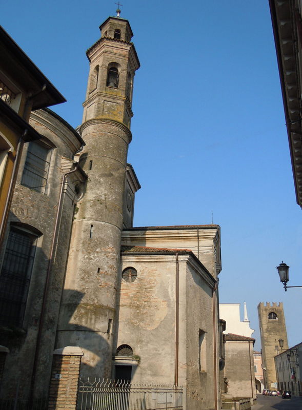 Castel Goffredo, Via Mantova.